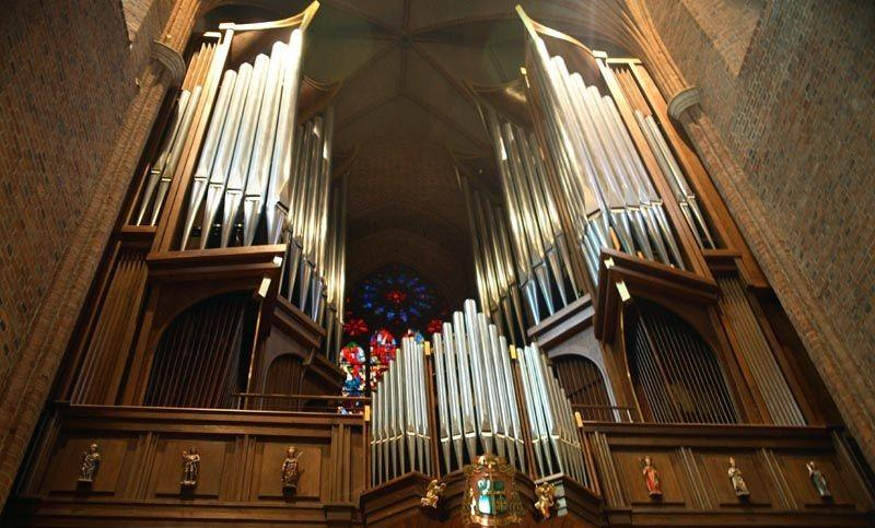 Polska